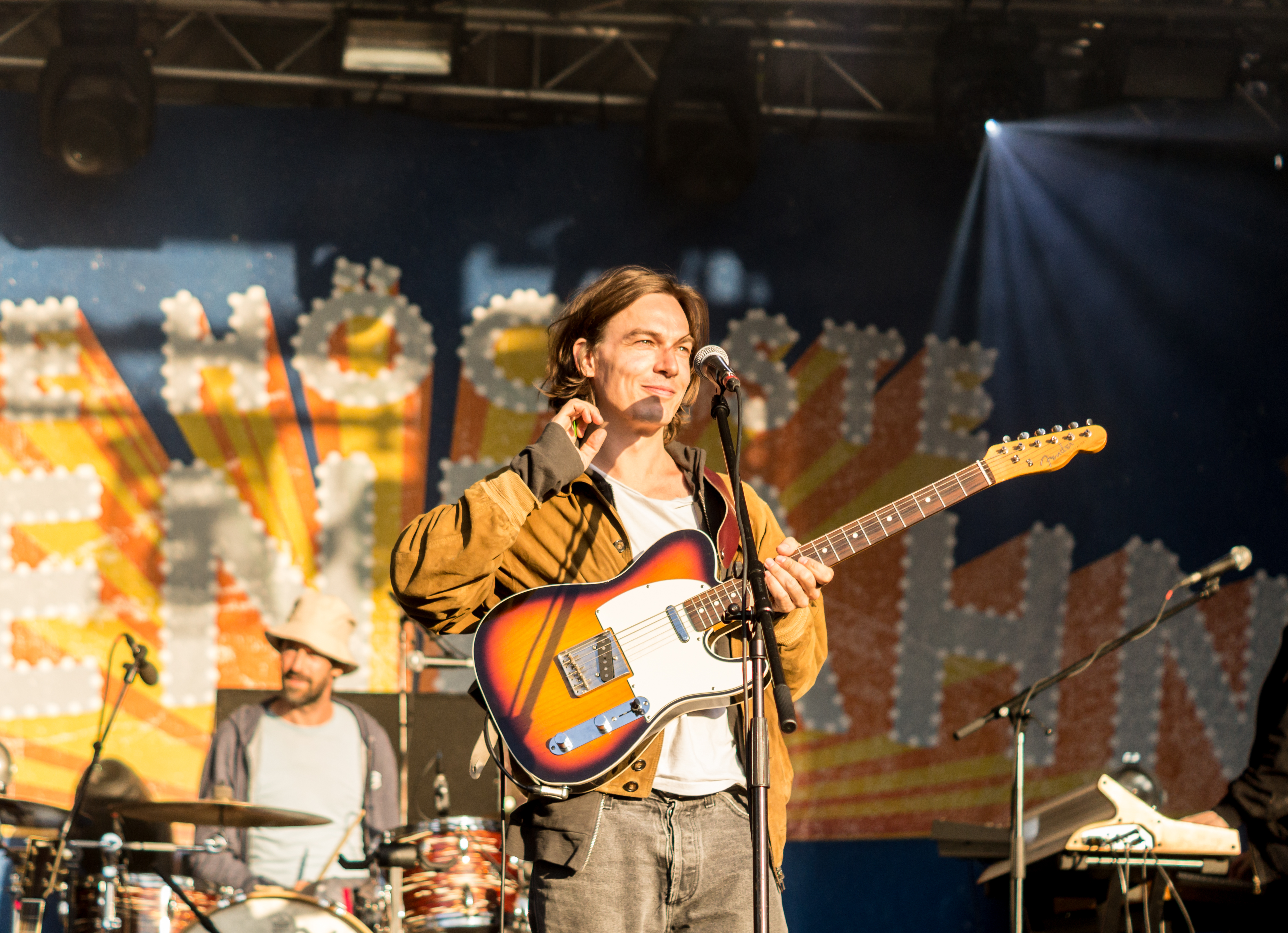 Moritz Krämer mit der Band Die Höchste Eisenbahn auf dem Kosmonaut Festival 2017.